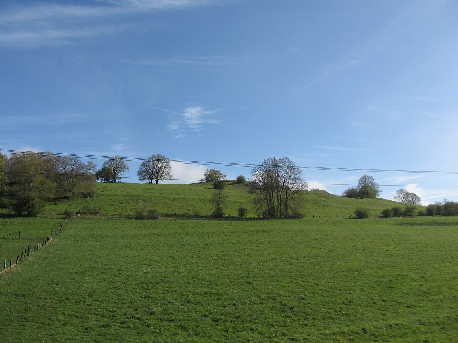 Naturschutzgebiet Schaaken (oberhalb der Buschreihe) von Süden).